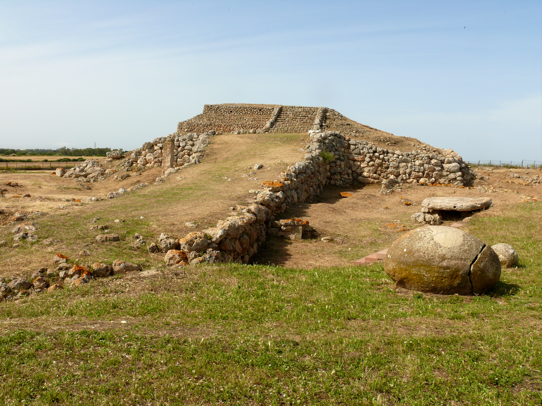 Altare prenuragico di Monte D' Accoddi (Sassari, Sardegna)